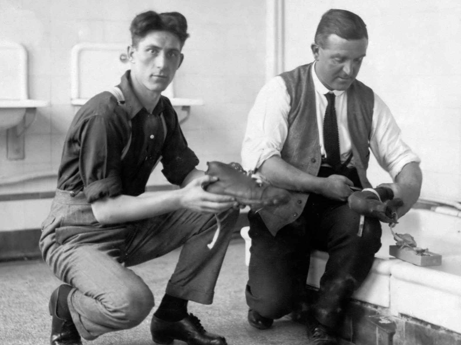 Peer Krom verzorgt zijn schoeisel samen met oefenmeester Bob Glendenning. Nederland - Zwitserland (4-1), gespeeld op 25 november 1923 in het Stadion te Amsterdam. 25 november 1923